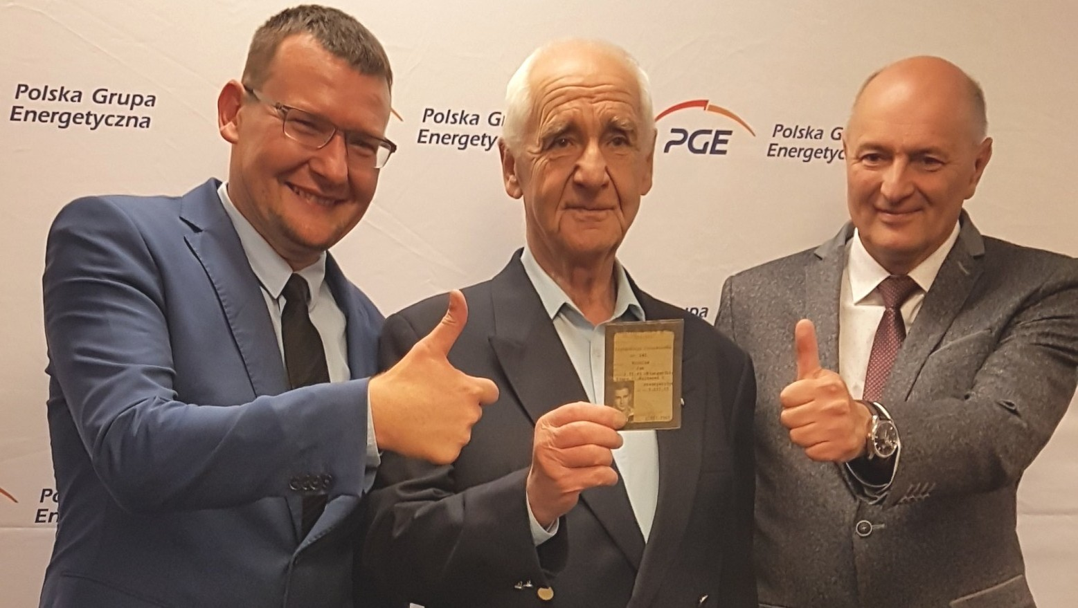 70-lecie Spójni Stargard. Gala